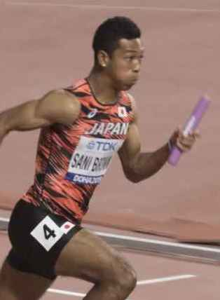 DOH80519 4x100m men final lyles